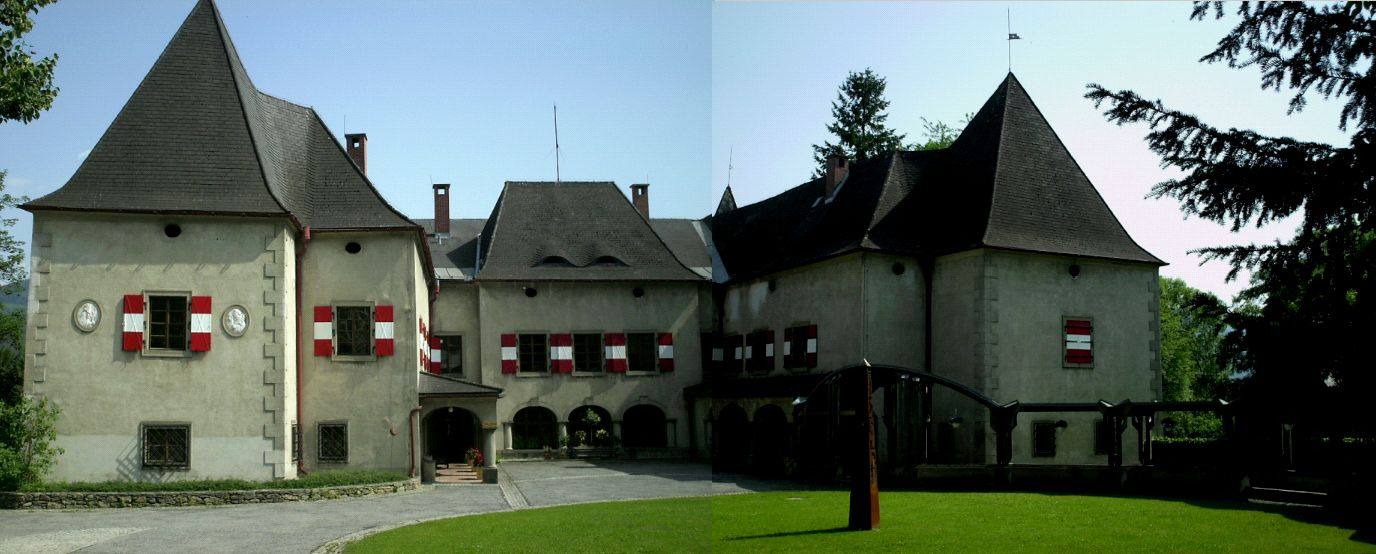 Forstwirtschaftsschule Schloss Pichl in Mitterdorf/Österreich. Object location47° 32′ 23.76″ N, 15° 30′ 43.41″ E